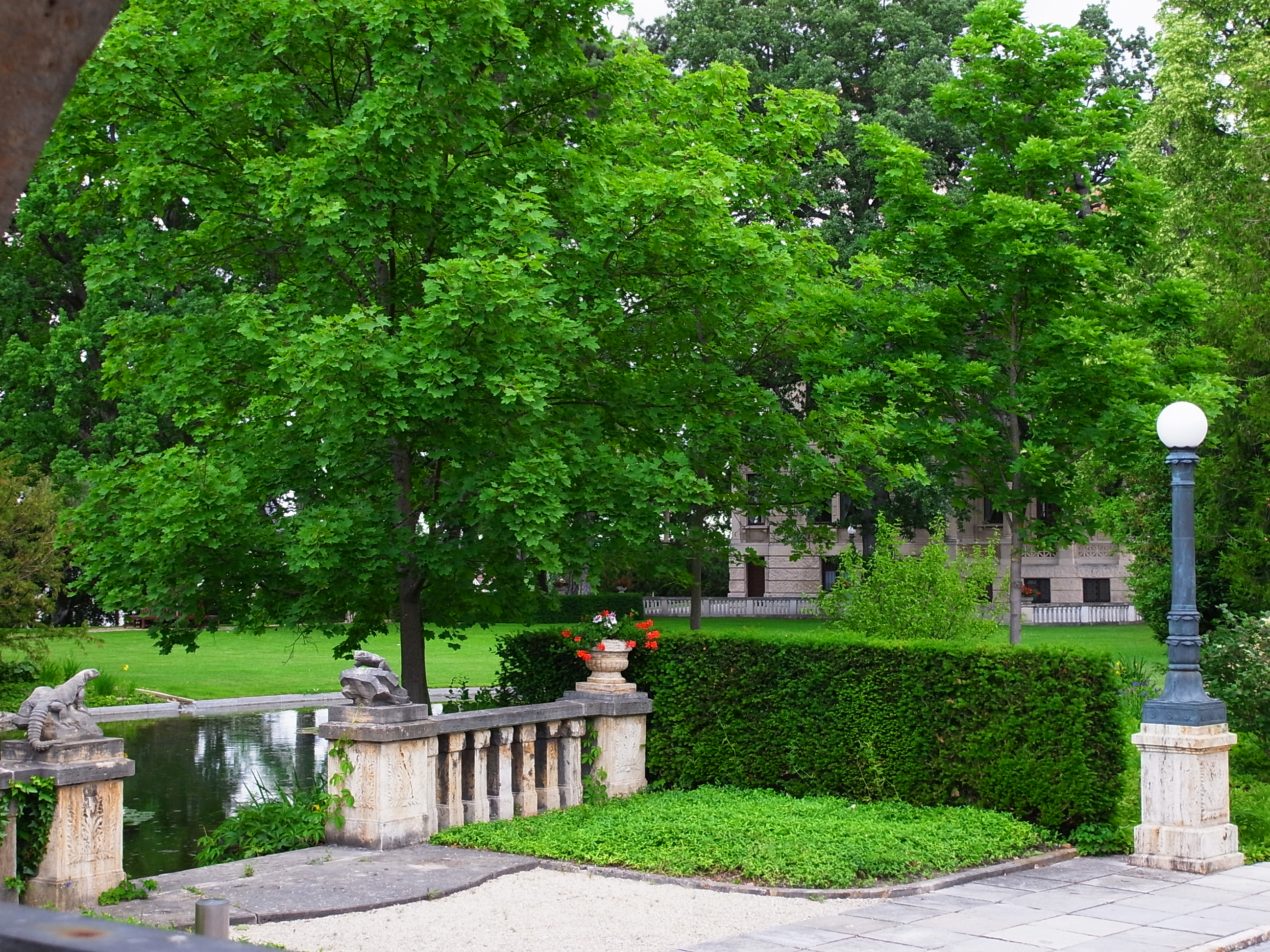 Die Parkanlage des Anwesens von Süden mit Blick auf die Villa